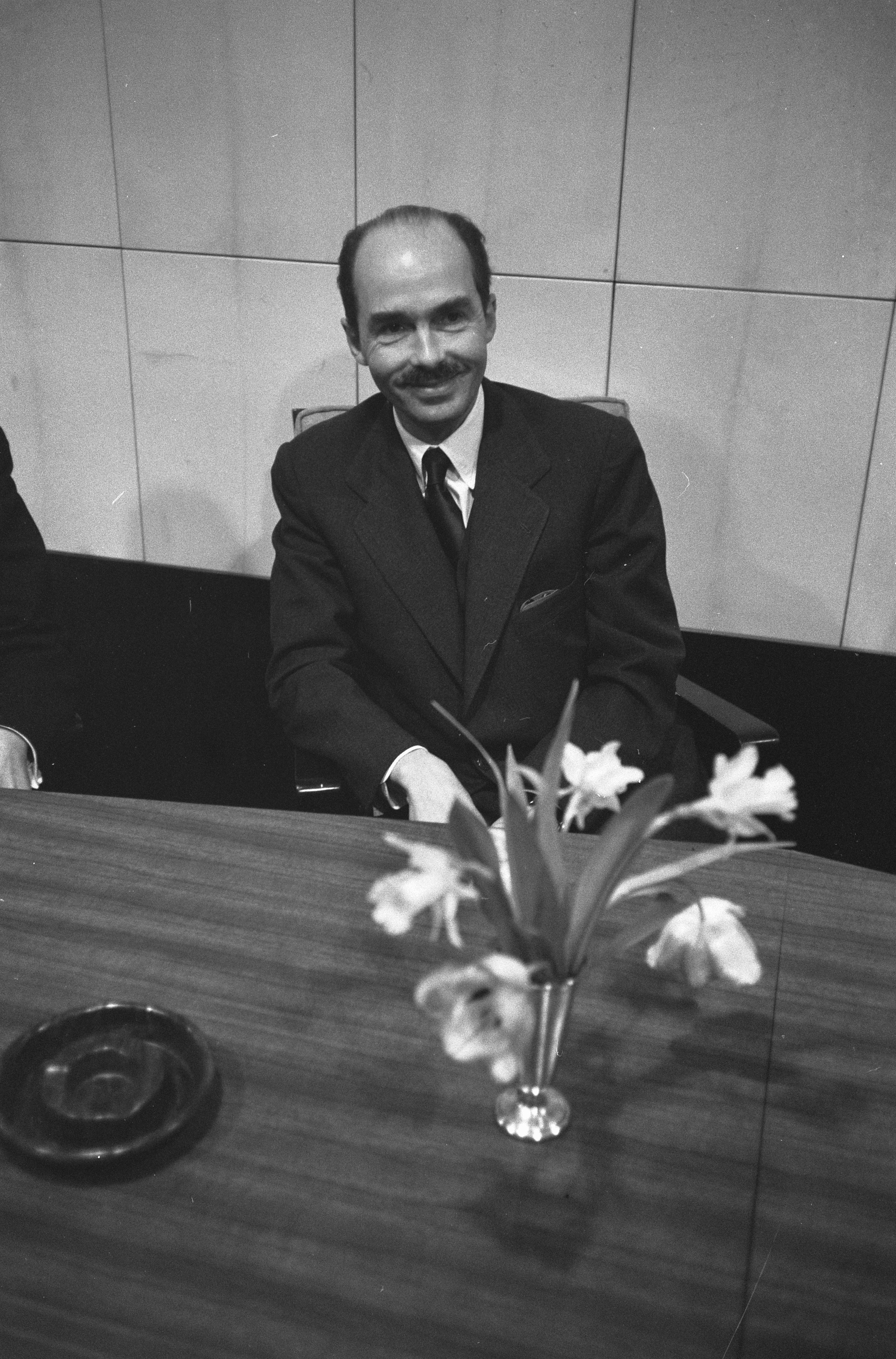 Collectie / Archief : Fotocollectie Anefo Reportage / Serie : [ onbekend ] Beschrijving : Aankomst van de Oostenrijkste troonpretendent uit Munchen op Schiphol, Otto van Habsburg tijdens de persconferent Datum : 8 februari 1961 Locatie : Noord-Holland, Schiphol Trefwoorden : Troonpretendent, aankomsten, persconferenties Persoonsnaam : Otto van Habsburg Fotograaf : Pot, Harry / Anefo Auteursrechthebbende : Nationaal Archief Materiaalsoort : Negatief (zwart/wit) Nummer archiefinventaris : bekijk toegang 2.24.01.05 Bestanddeelnummer : 912-0730